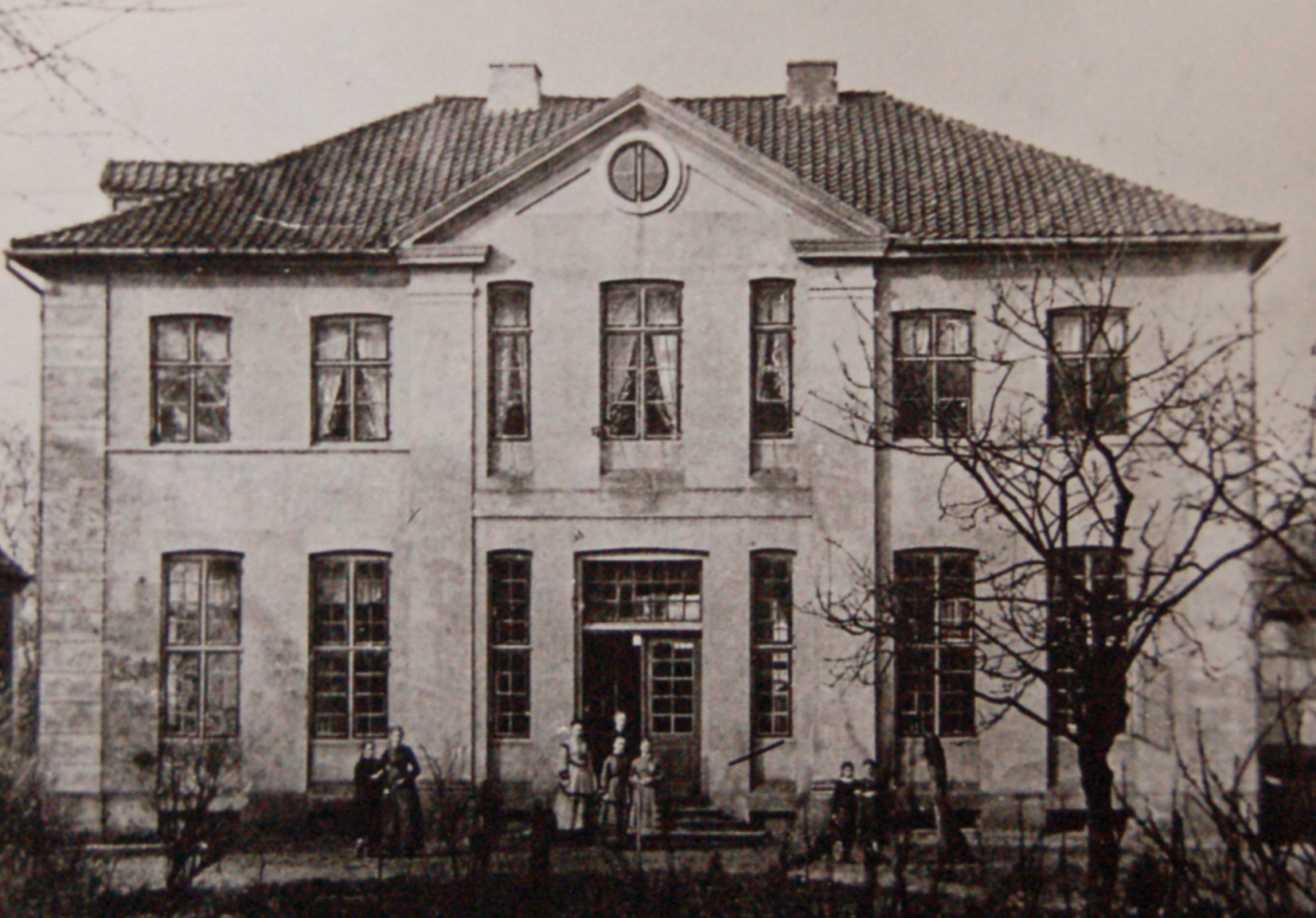 Das ehemalige Kulturdenkmal in der Mühlenstraße in Uetersen aus der Zeit vor 1762.